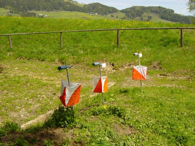 Orientierungslaufposten (Letzter Posten beim 2. österreichischen Ranglistenlauf 2004 in Seckau/Österreich)